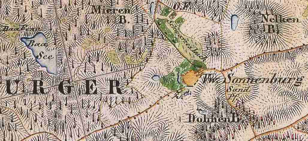 Sonnenbueg, bewohnter Stadtteil von Bad Freienwalde (Oder), Landkreis Märkisch-Oderland, Brandenburg, Deutschland, Ausschnitt aus dem Urmesstischblatt 3250 Bad Freienwalde von 1844